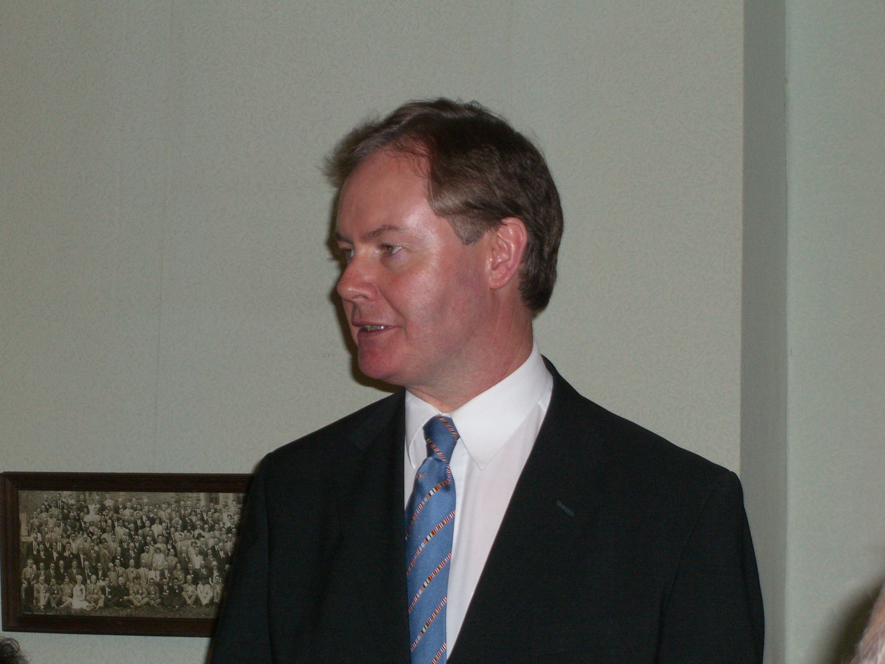 Seán Ó Riain festprelegas dum la Zamenhof-vespero en Antverpeno en 2006.